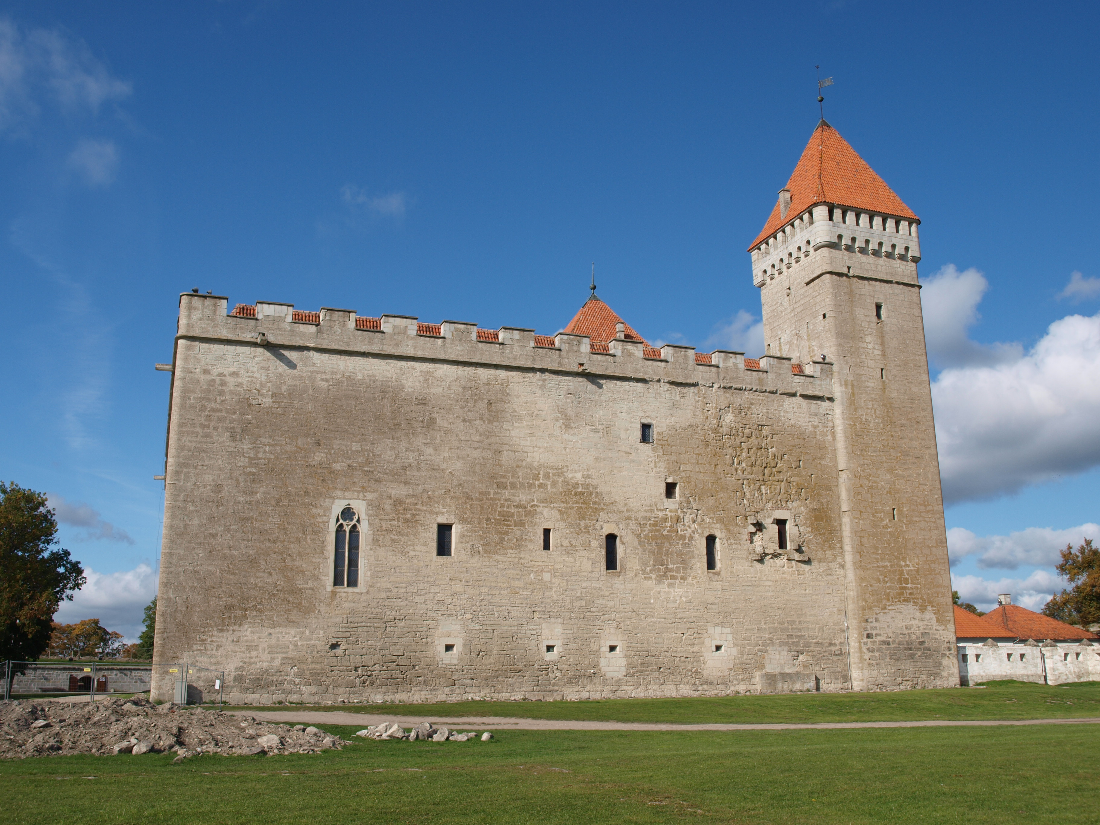 Foto on tehtud II maailmasõjas hukkunute ühishaua poolt vaadatuna.